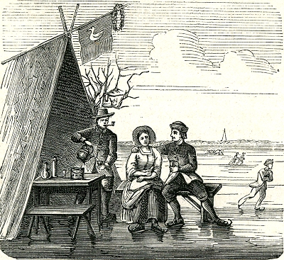 Koek en Zoepie op een houtsnede uit 1779